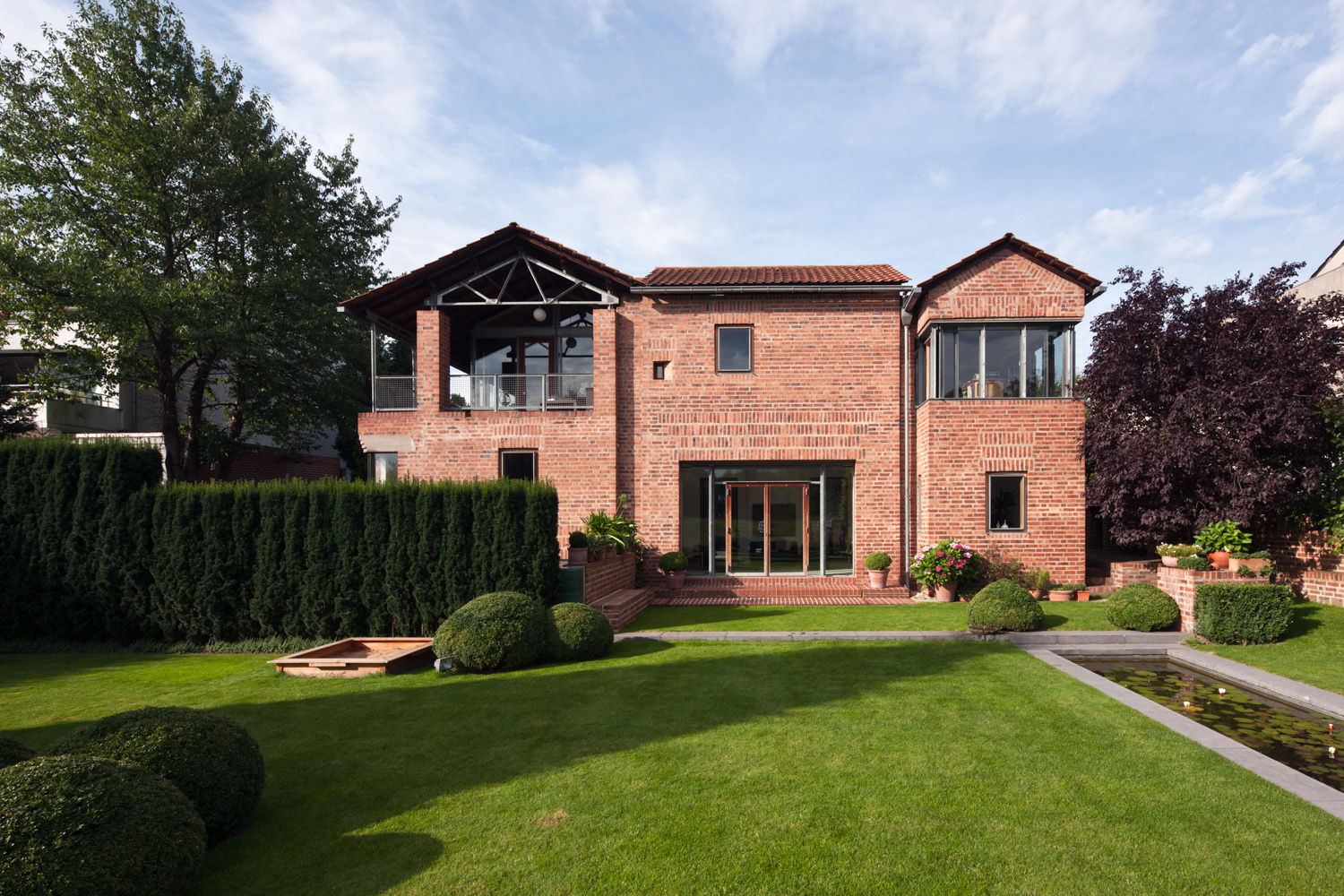 Bienefeld. Haus Heinze-Manke, Gartenseite. 2012